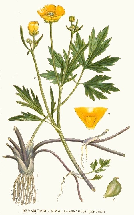 Original Description Revsmörblomma, Ranunculus repens L.